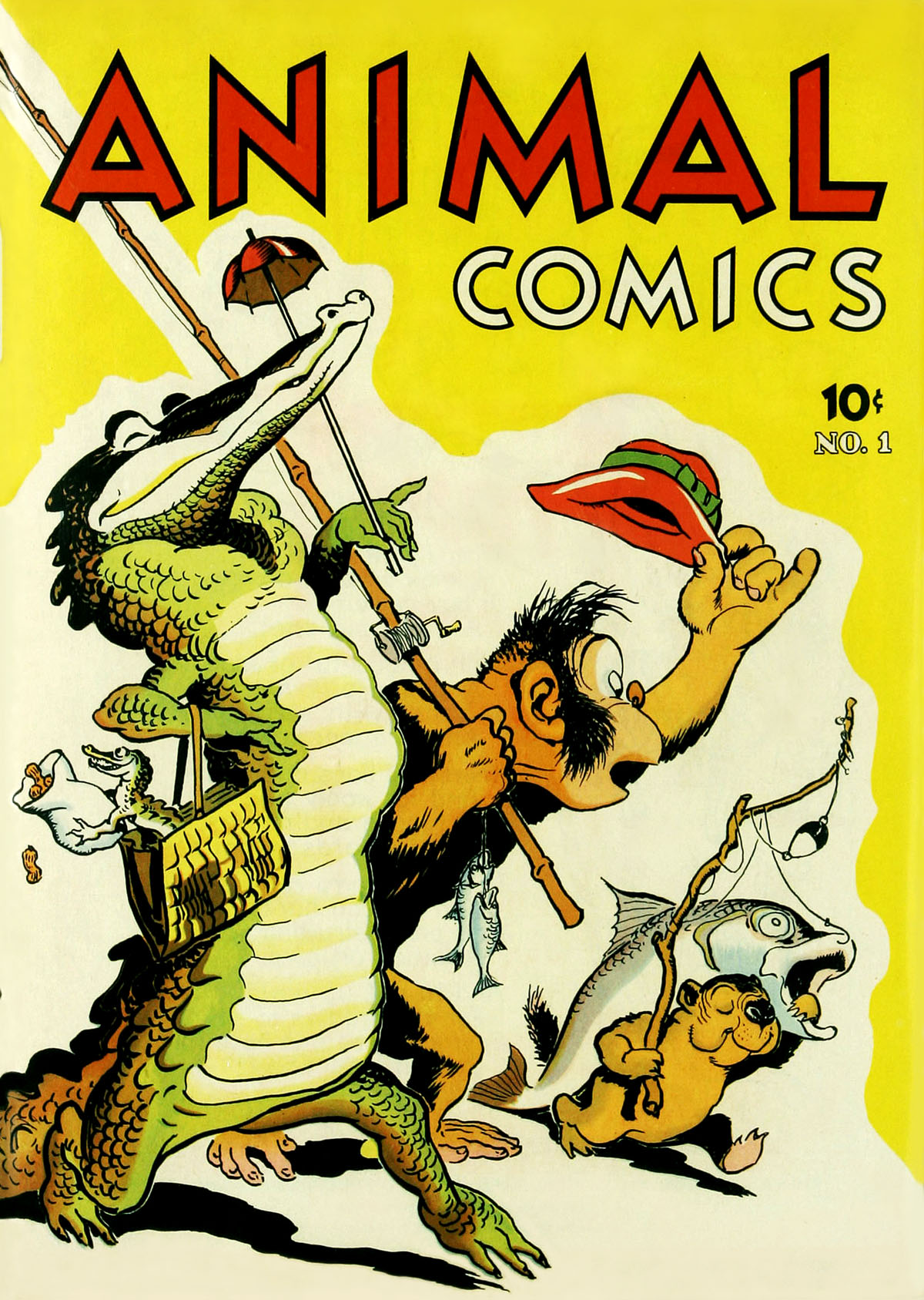 couverture du comics Animal Comics publié par Dell Publishing company (plus connu sous le nom de Dell Comics) en 1942